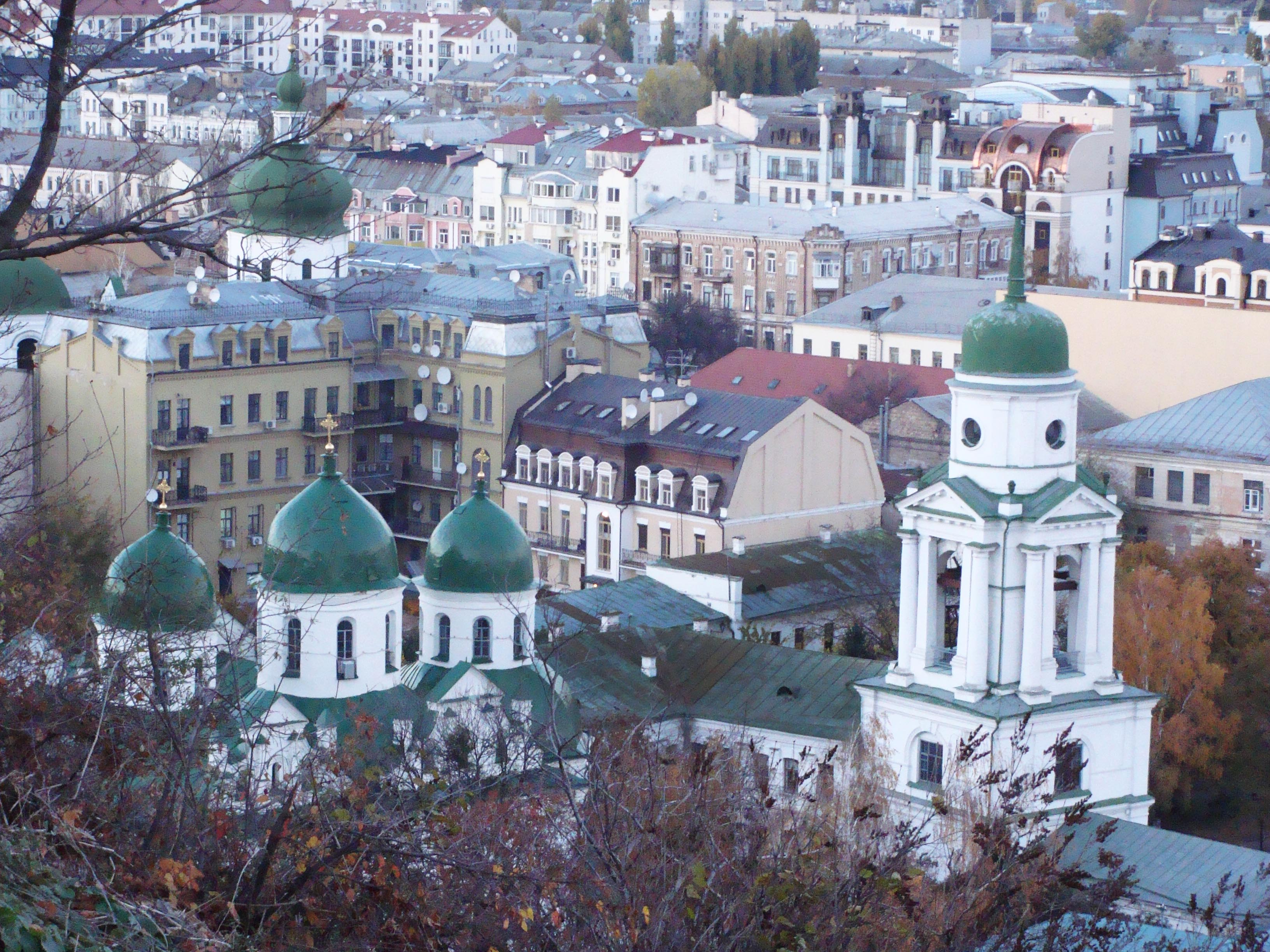 Комплекс Флорівського Вознесенського монастиря, Київ, Фролівська вул., 6